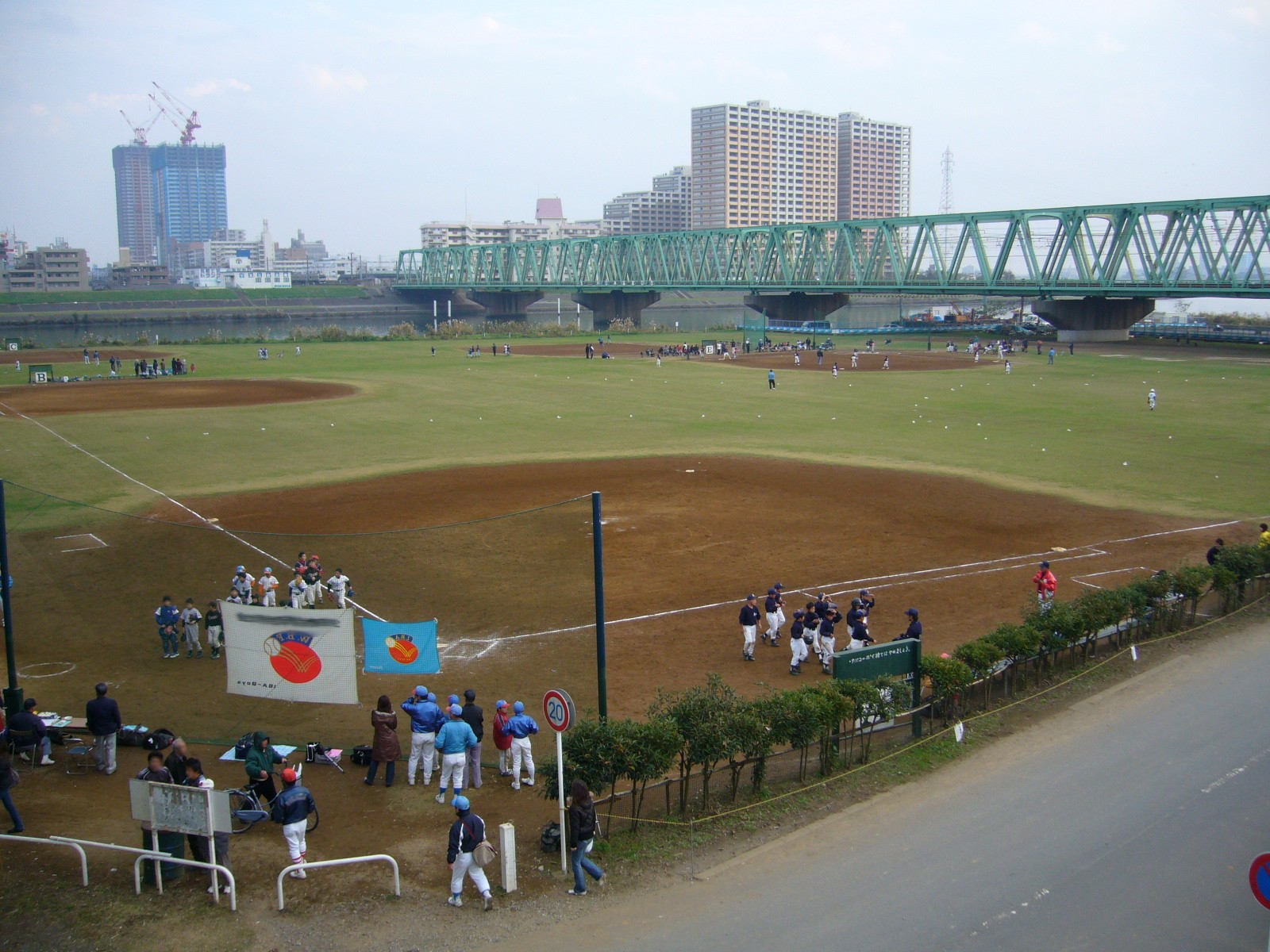 国道14号市川橋付近より、北小岩少年野球場と対岸の市川市のマンション群を望む。画面左手には建設中のI-linkタウンいちかわが見える。